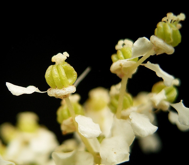 Filipendula ulmaria